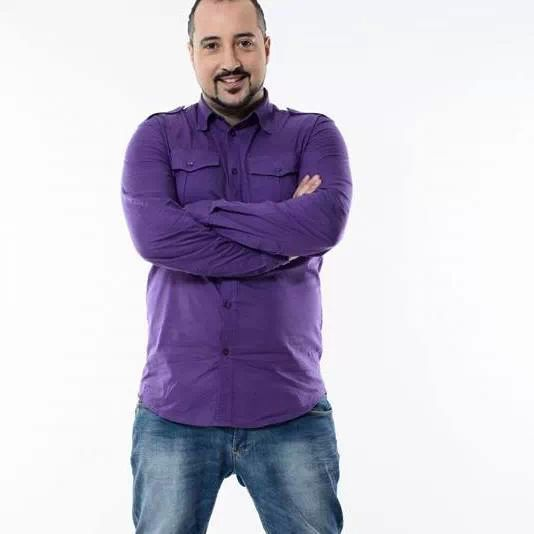 Алекс